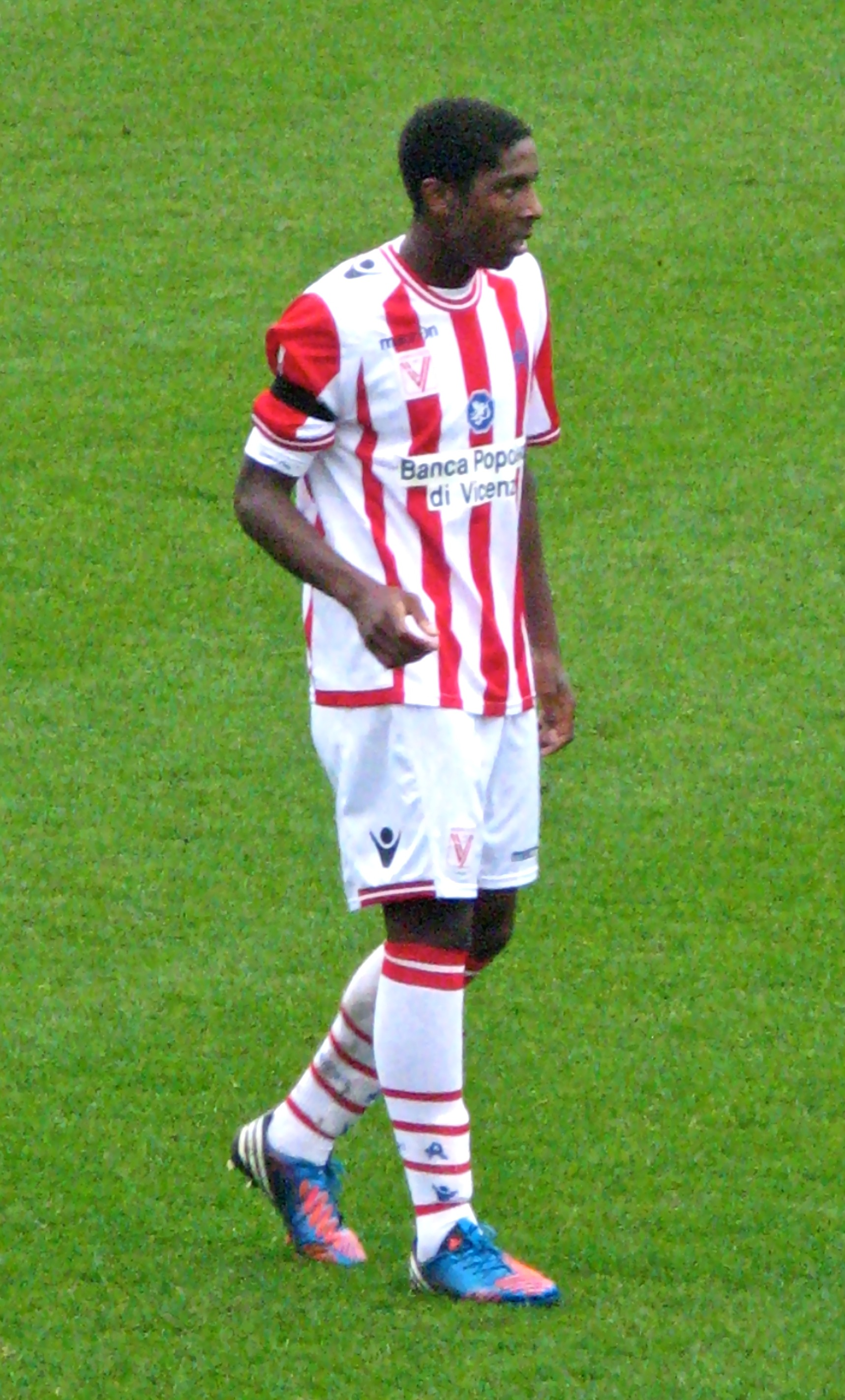 Dominique Malonga, attaccante, con la maglia del Vicenza.